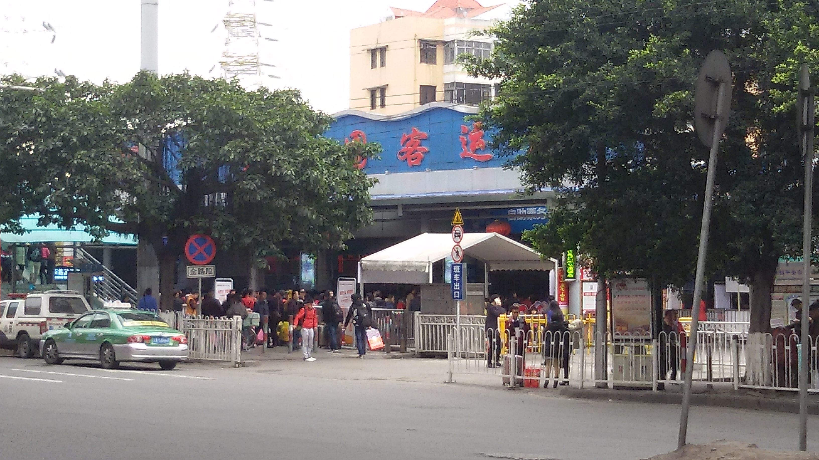 粵語: 羅沖圍汽車客運站